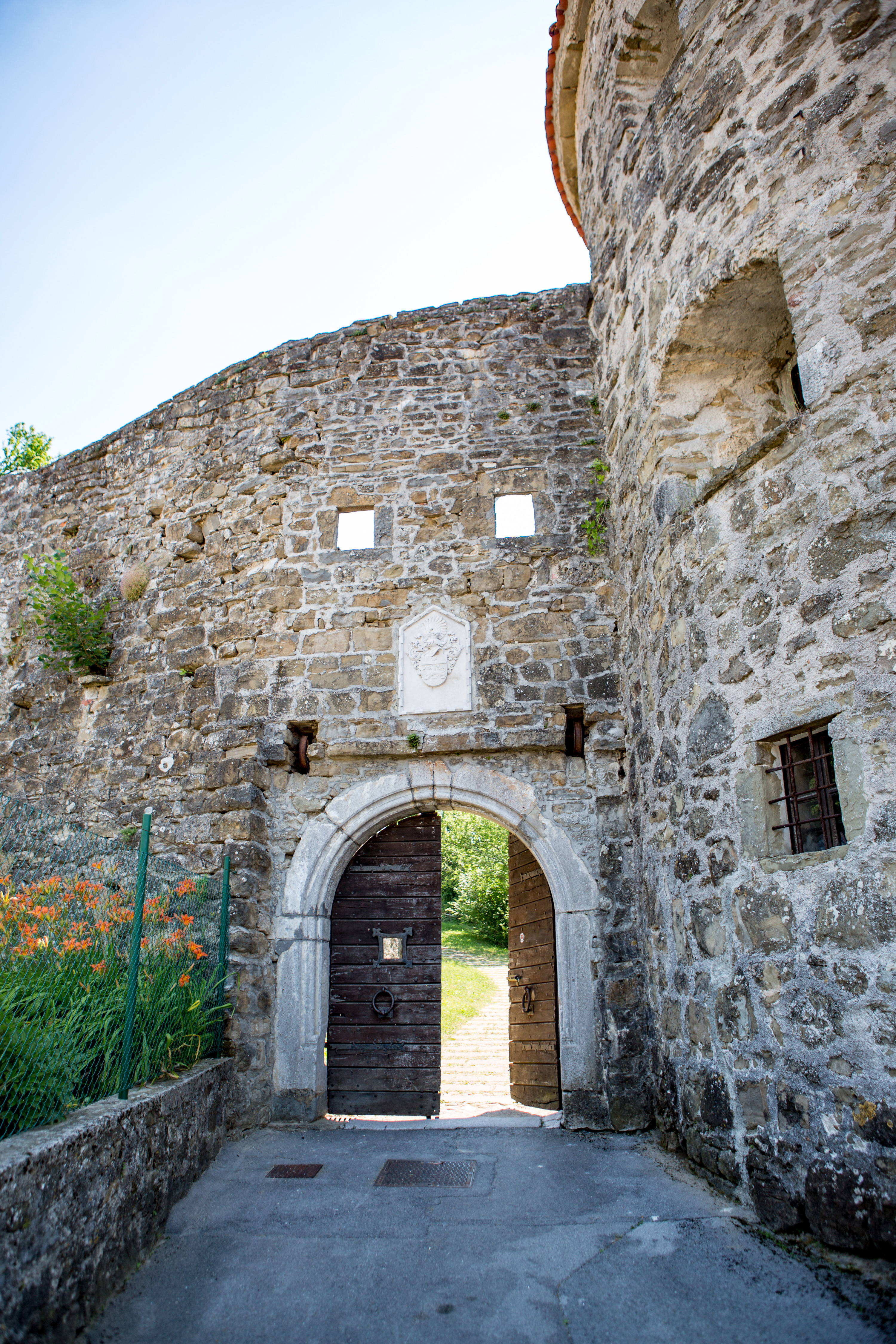 Nad poznogotskim portalom je replika heraldične plošče Bruna Zuccolinija (original je razstavljen v gradu).